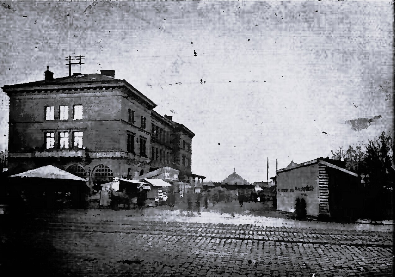 Seit alter Zeit hatte sich der Weihnachtsmarkt mit seinem Budenzauber auf dem Lübecker Marktplatz erhalten. Allmählig war nun der Platz um den Marktbrunnen herum zu eng geworden. So wurde 1924 der Platz wischen dem Holstentor und dem alten Bahnhof mit hinzugenommen, wo sich ein überaus reges Leben abspielte. Dies war auch deswegen der Fall, da diese Filiale des Weihnachtsmarktes sich durch Karussells, Luftschaukeln und und andere Vergnügungsinstitute, die es auf dem Marktplatz nicht gab, auszeichnete.